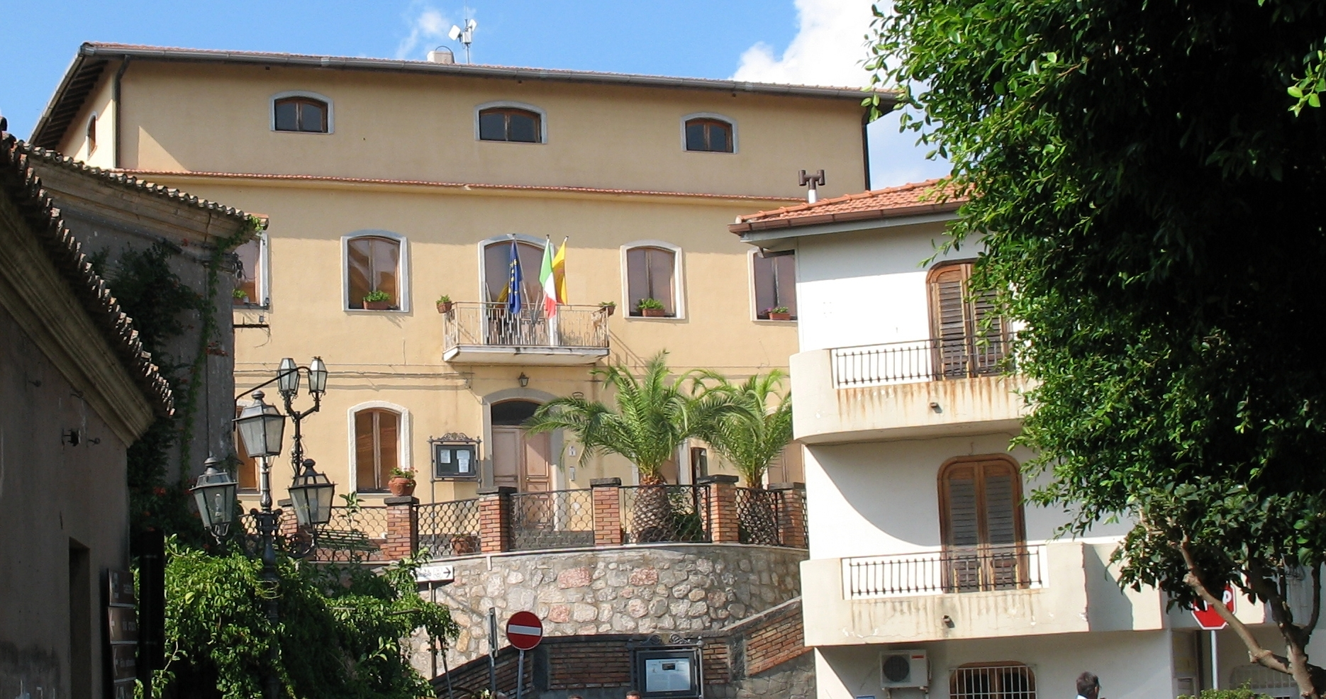 monicipio